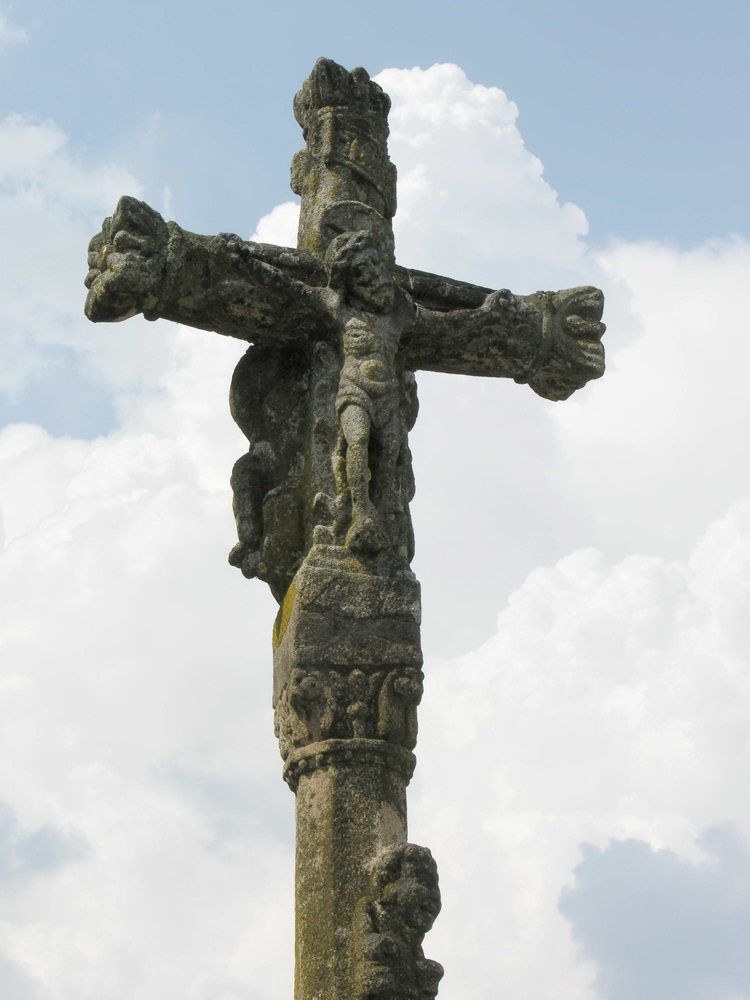 Cruceiro, Padrón, Galicia Publish by= Luis Miguel Bugallo Sánchez.